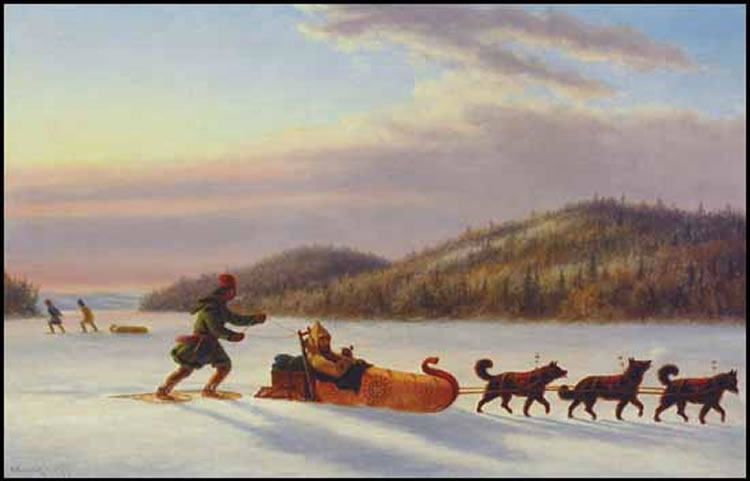 Fur Trader in Toboggan